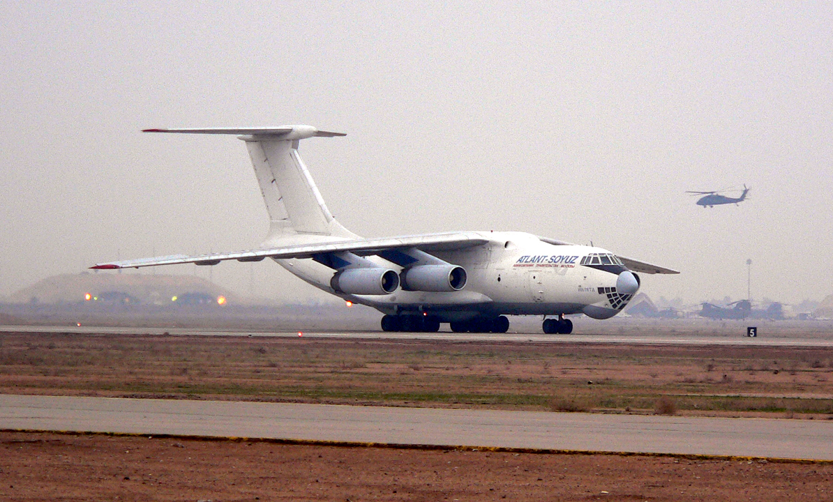 An Ilyushin Il-76 landing at Balad Air Base in Iraq in 2005.